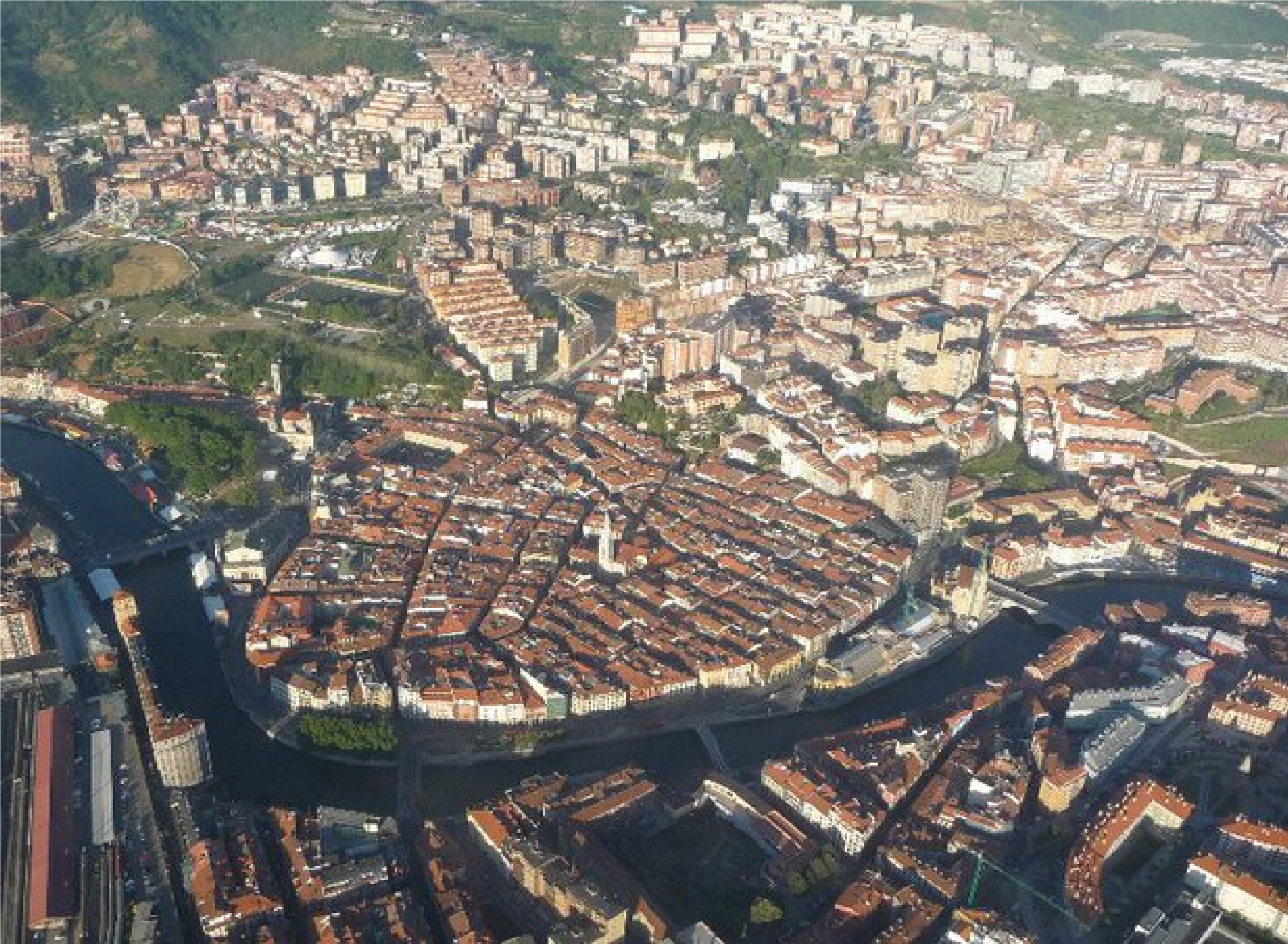 Bilboko Alde Zaharra (Alejandraren argazkia hegazkinetik)